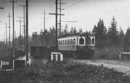 Interurban